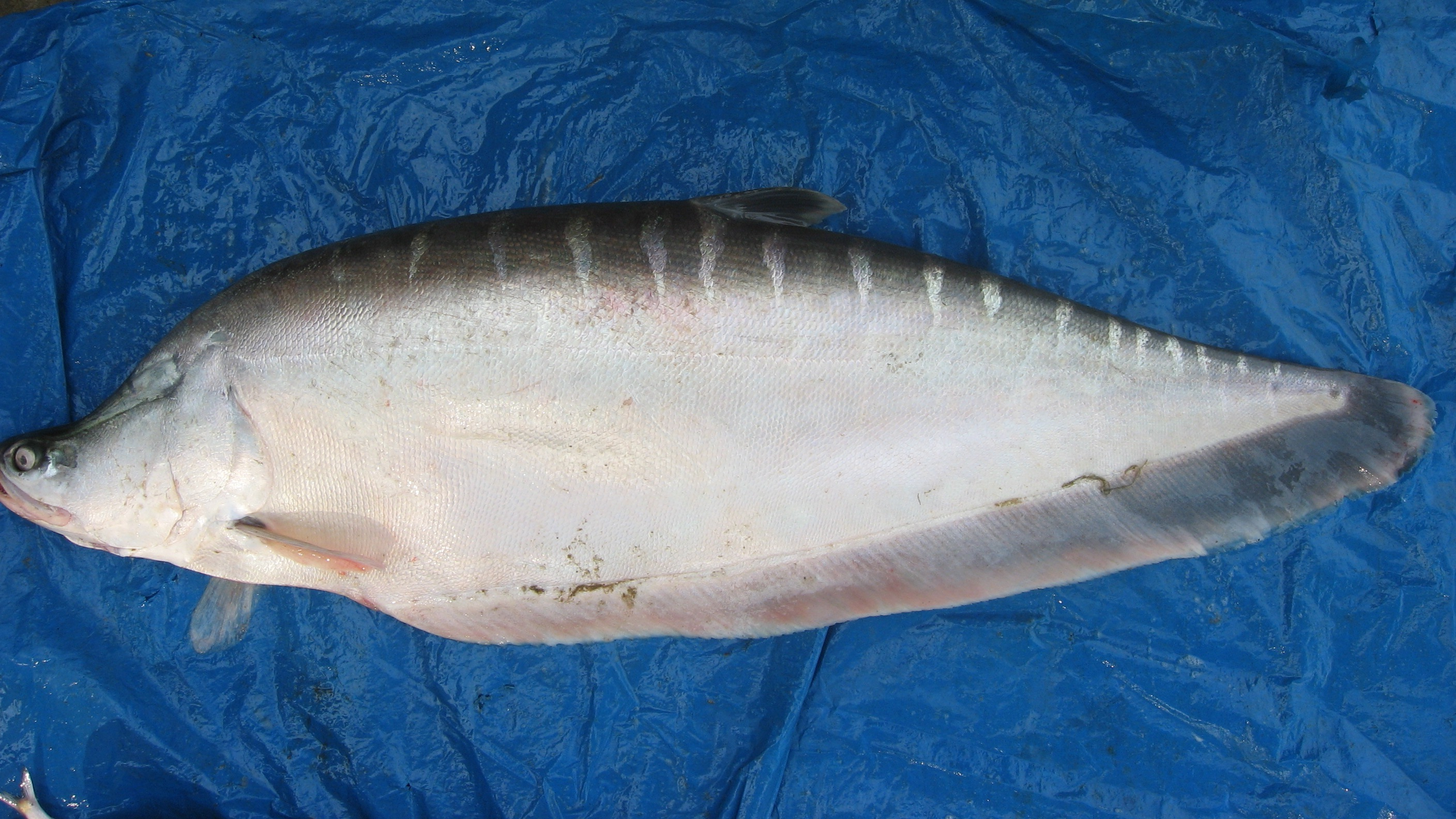 অসমীয়া: চিতল মাছ।